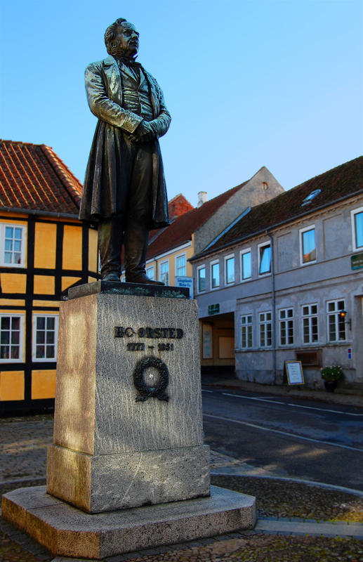 H.C. Ørsted statue i Rudkøbing, Langeland, Danmark.